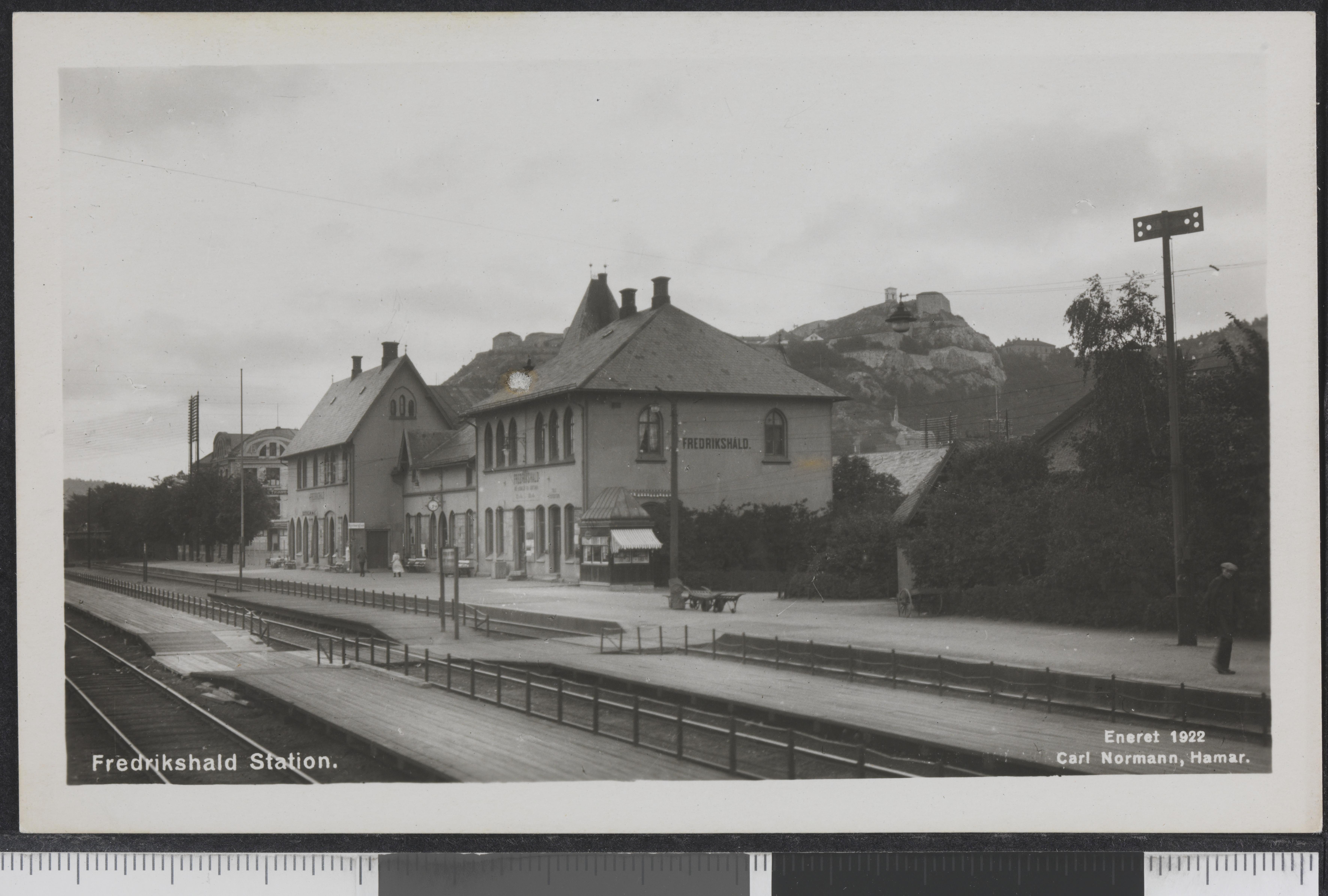 Bildet er hentet fra Nasjonalbibliotekets bildesamling Halden stasjon, Halden, Østfold